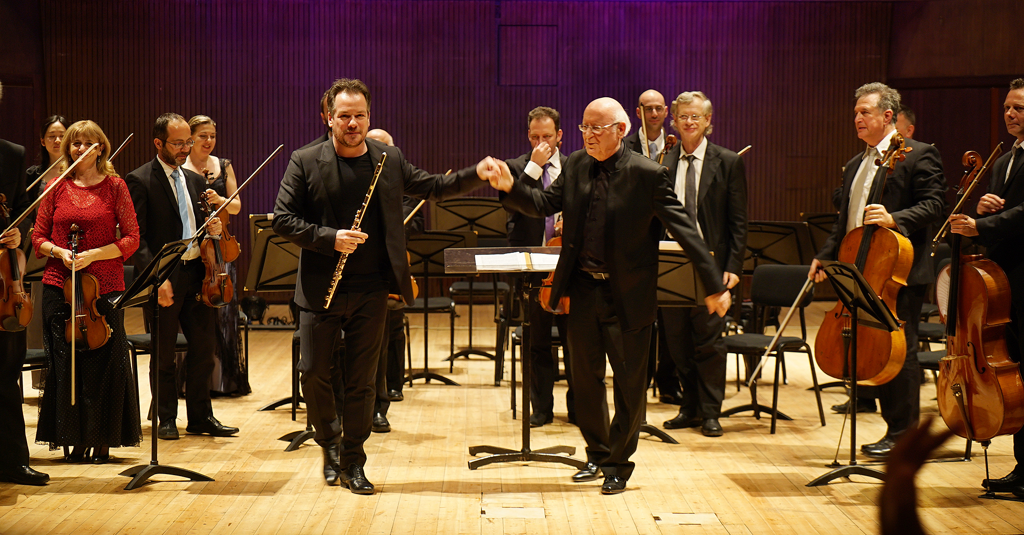 Emmanuel Pahud - OPUS Festival